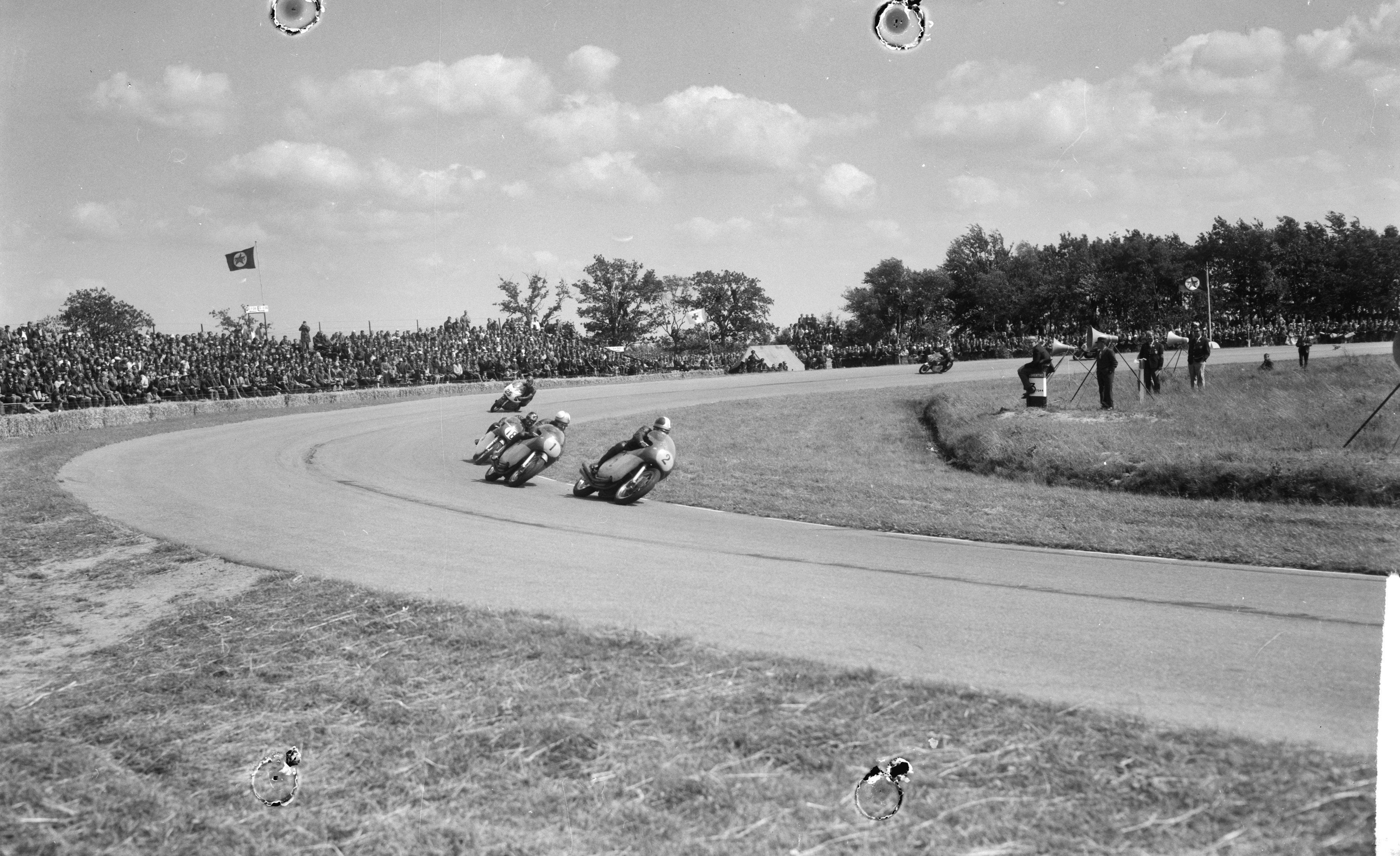 Collectie / Archief : Fotocollectie Anefo Reportage / Serie : TT Assen 1965 Beschrijving : Het hoofdnummer de 500 cc klasse, winnaar Mike Hailwood (nr. 1) in actie Datum : 26 juni 1965 Locatie : Assen Trefwoorden : motorsport Persoonsnaam : Hailwood, Mike Fotograaf : Bilsen, Joop van / Anefo Auteursrechthebbende : Nationaal Archief Materiaalsoort : Negatief (zwart/wit) Nummer archiefinventaris : bekijk toegang 2.24.01.04 Bestanddeelnummer : 917-9045 Reacties Geplaatst door Anoniem op 17 februari 2017 - 16:51. 19650500-019-Giacomo Agostini 2(I)Mv Agusta,2e, Mike Hailwood 1(Gb)Mv Agusta,1e, Paddy Driver 18(Zaf)Matchless, 3e, John Cooper 25(Gb)Norton,4e, 500cc Dutch TT Assen 1965